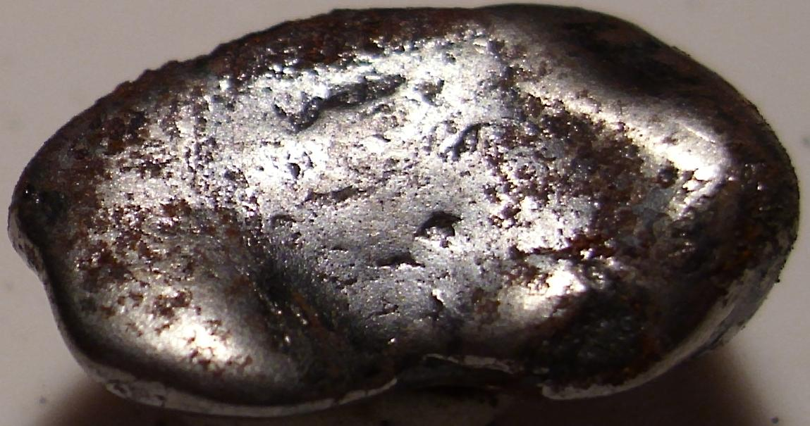 Odessa (Texas) Eisenmeteorit